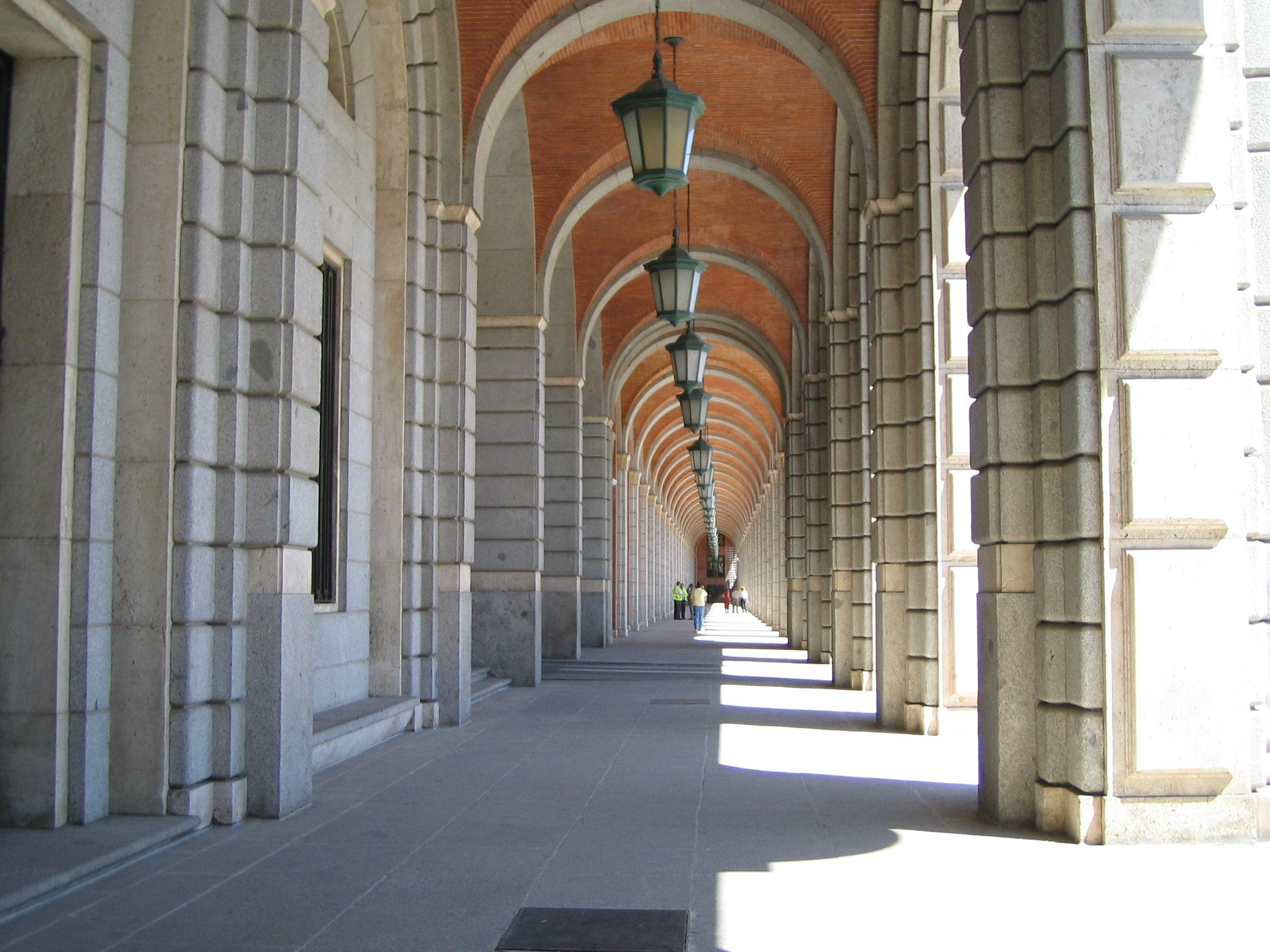 Nuevos Ministerios in Madrid city